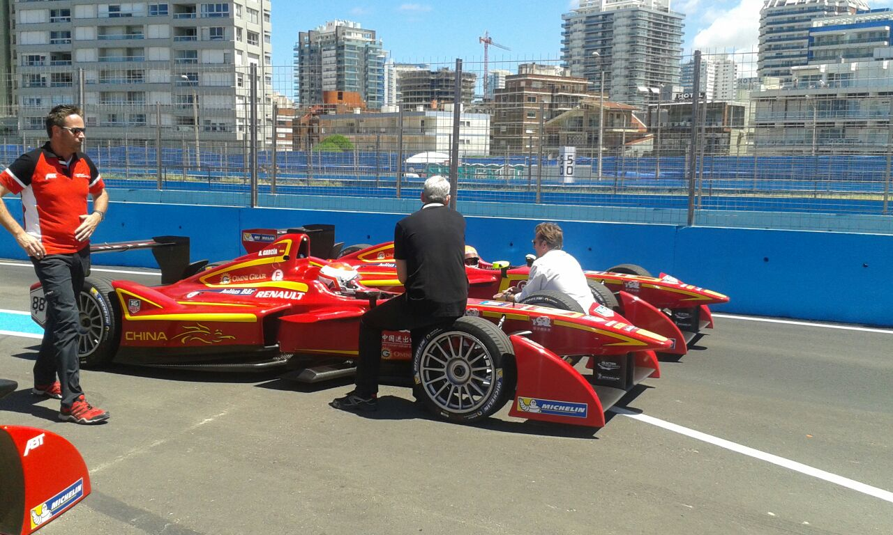 aaaaa